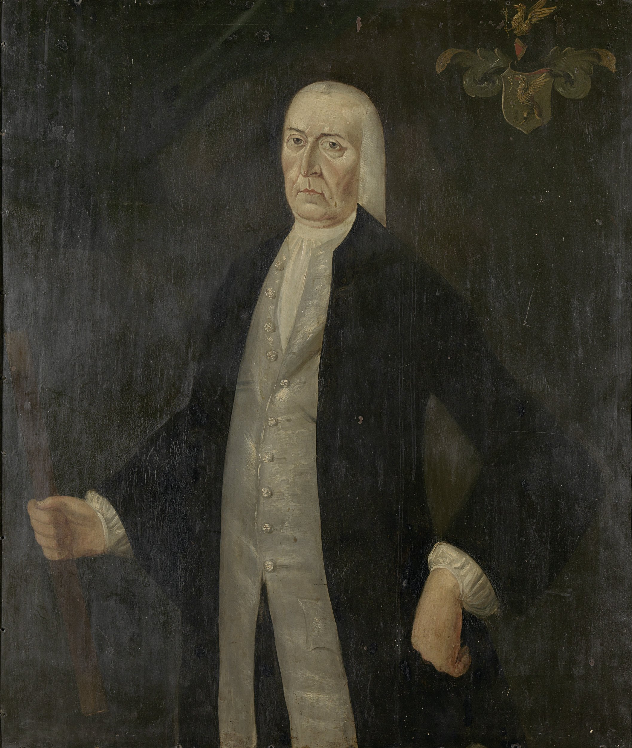 Portret van Jeremias van Riemsdijk (1712-77). Gouverneur-generaal (1775-77). Heupstuk, staande naar links. Commandostaf in de rechterhand, de linkerhand in de zij. Rechtsboven het familiewapen. Onderdeel van een reeks van portretten van de gouverneurs-generaal van het voormalige Nederlands Oost-Indië. Collection: schilderijen; Gouverneurs-generaal serie